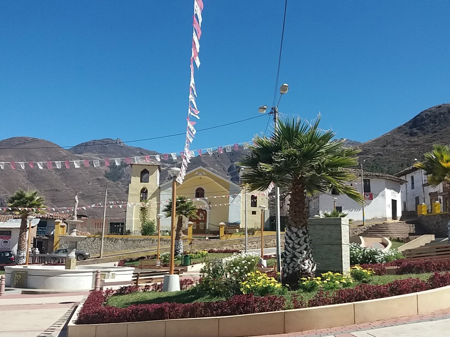 Plaza de Coris, capital del distrito ubicado en la Provincia de Aija, Departamento de Áncash, Perú.